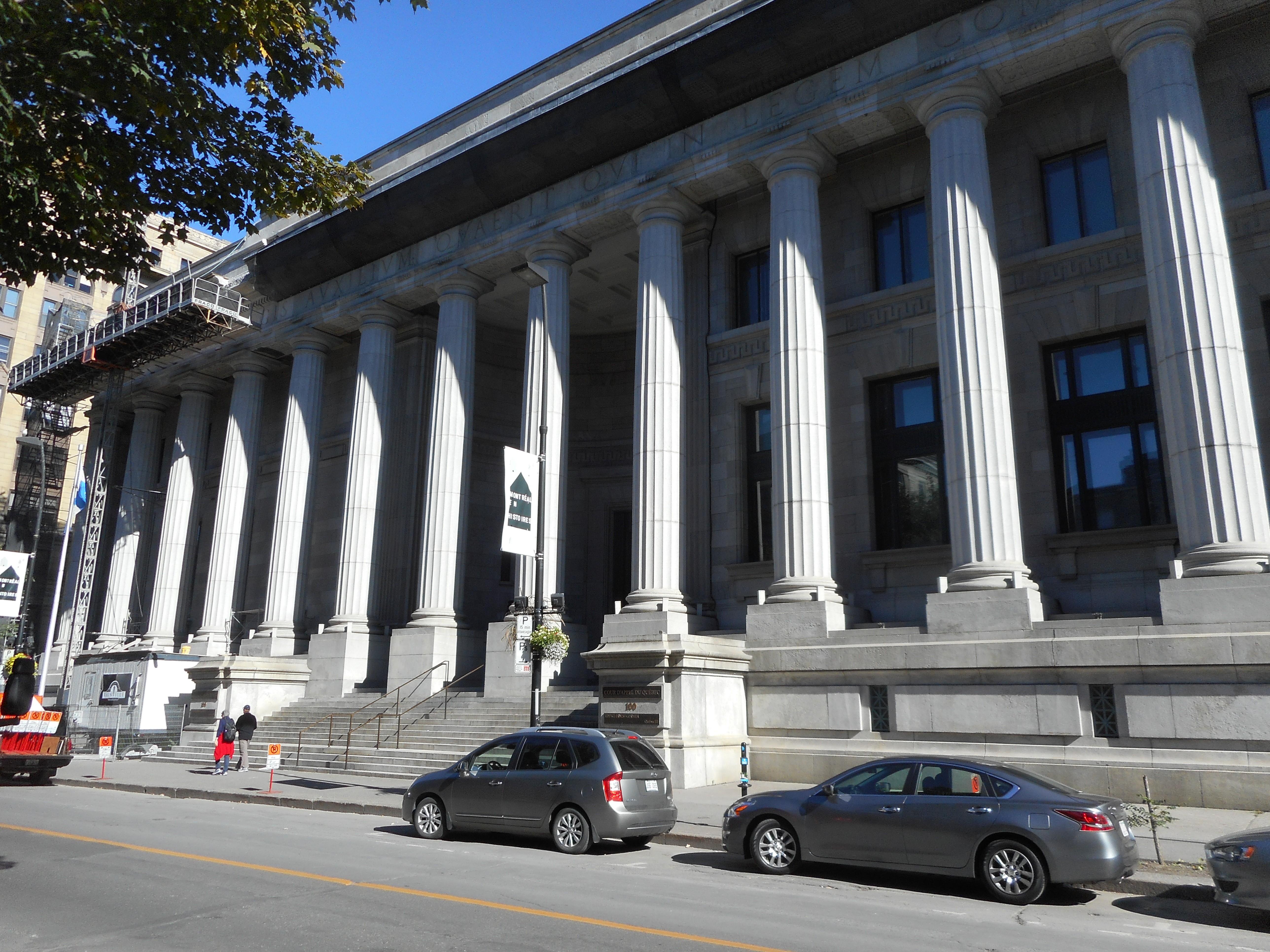 Édifice Ernest-Cormier, au 100 rue Notre-Dame Est à Montréal